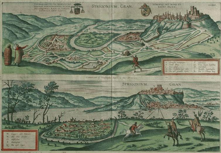 Hoefnagel mester metszete Esztergomról 1595. Balra fent: Bakócz Tamás címere Jobbra fent:Szatmári György címere